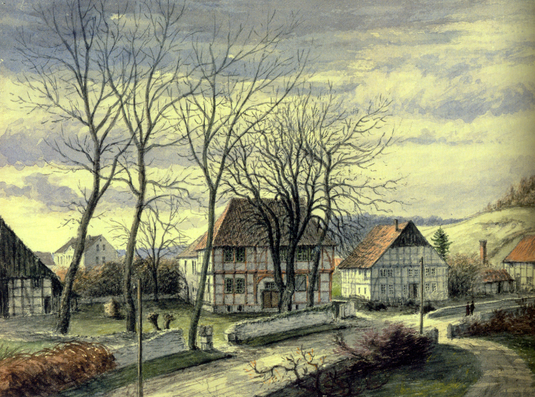 Zitiert aus der Bildbeschreibung des unten genannten Buchs: Hof Wendt in Heiligenkirchen. Ehemaliges Vogtei- und Kruggebäude von 1696. Aquarell von 1888 (WV 391)